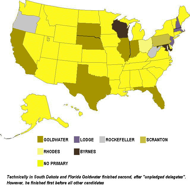 1964 Republican presidential primaries